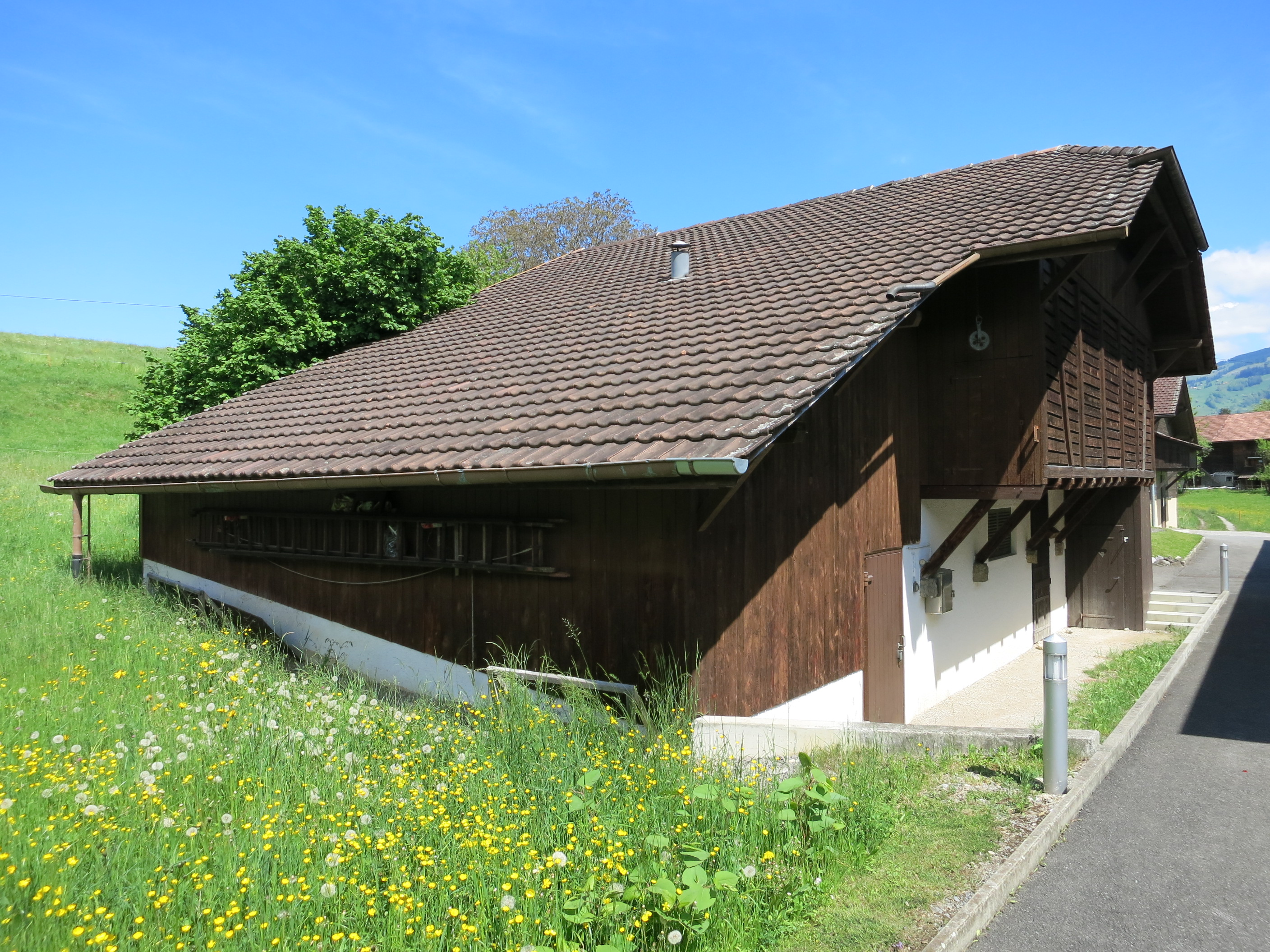 Artilleriewerk Faulensee, Spiez BE, Schweiz